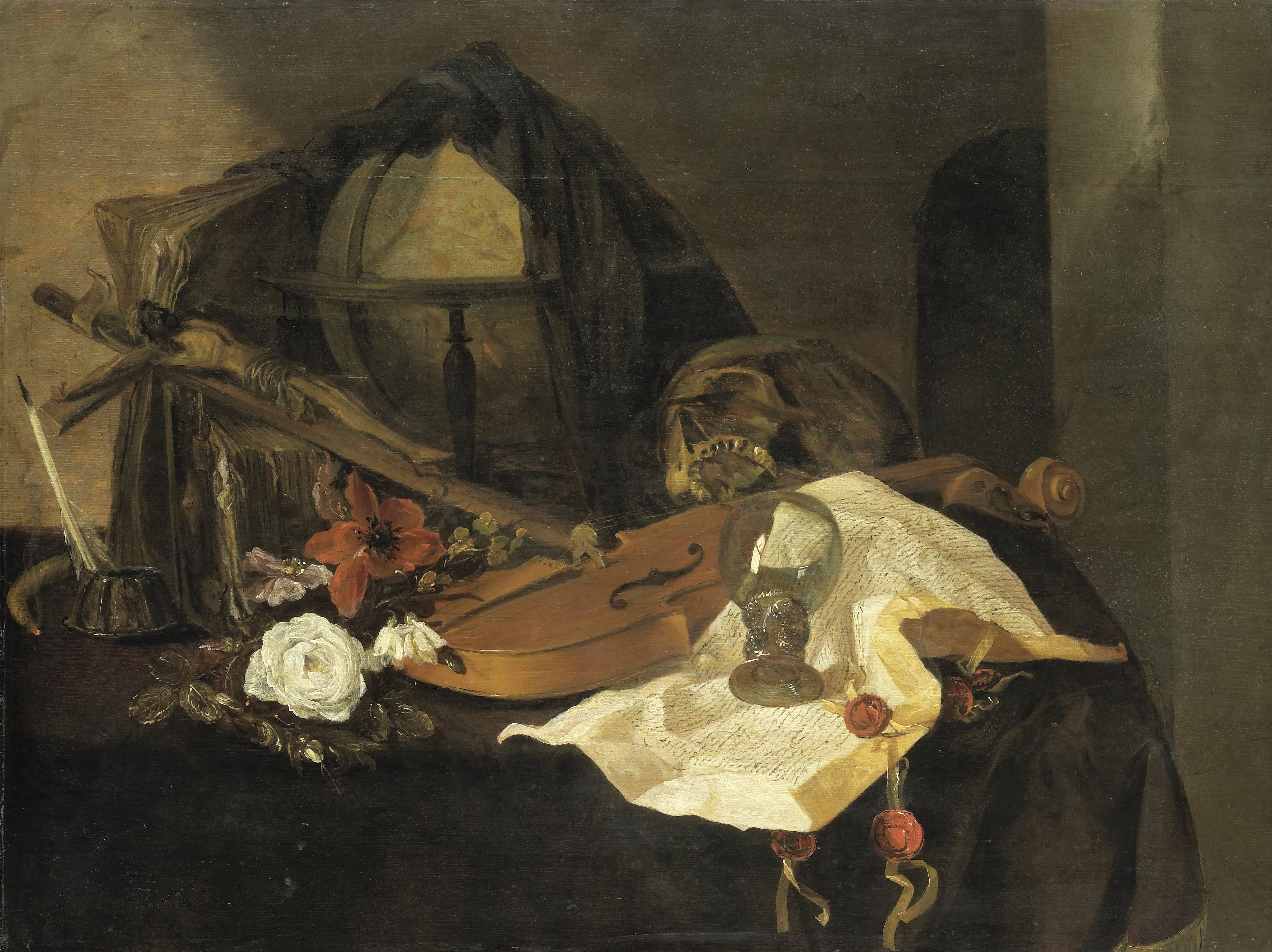 Vanitas stilleven. Op een tafel liggen een viool, een kruisbeeld, een schedel, bloemen, een roemer, een document met lakzegels, boeken, een inktstel en een globe.